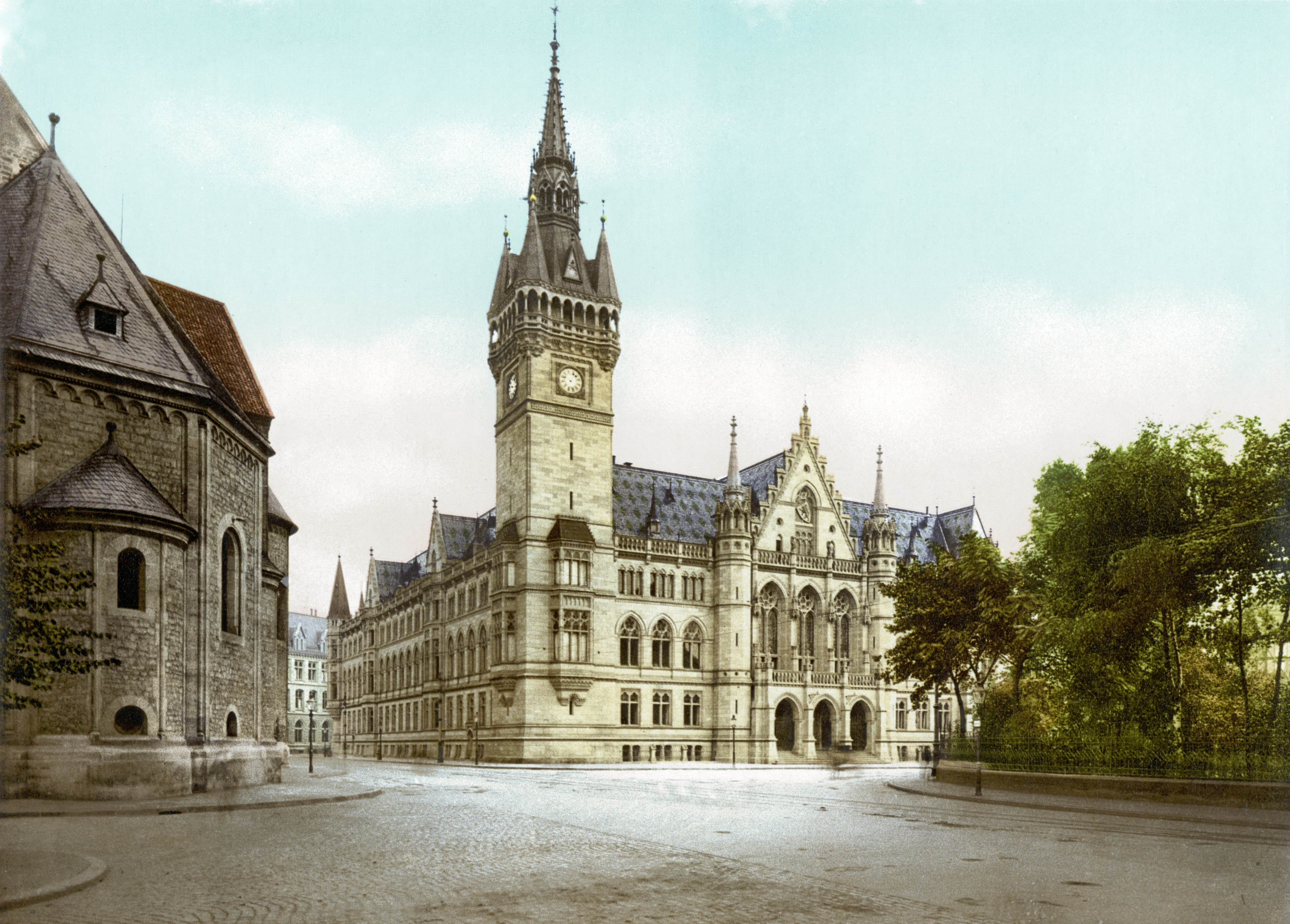 Das neogotische neue Braunschweiger Rathaus um 1900